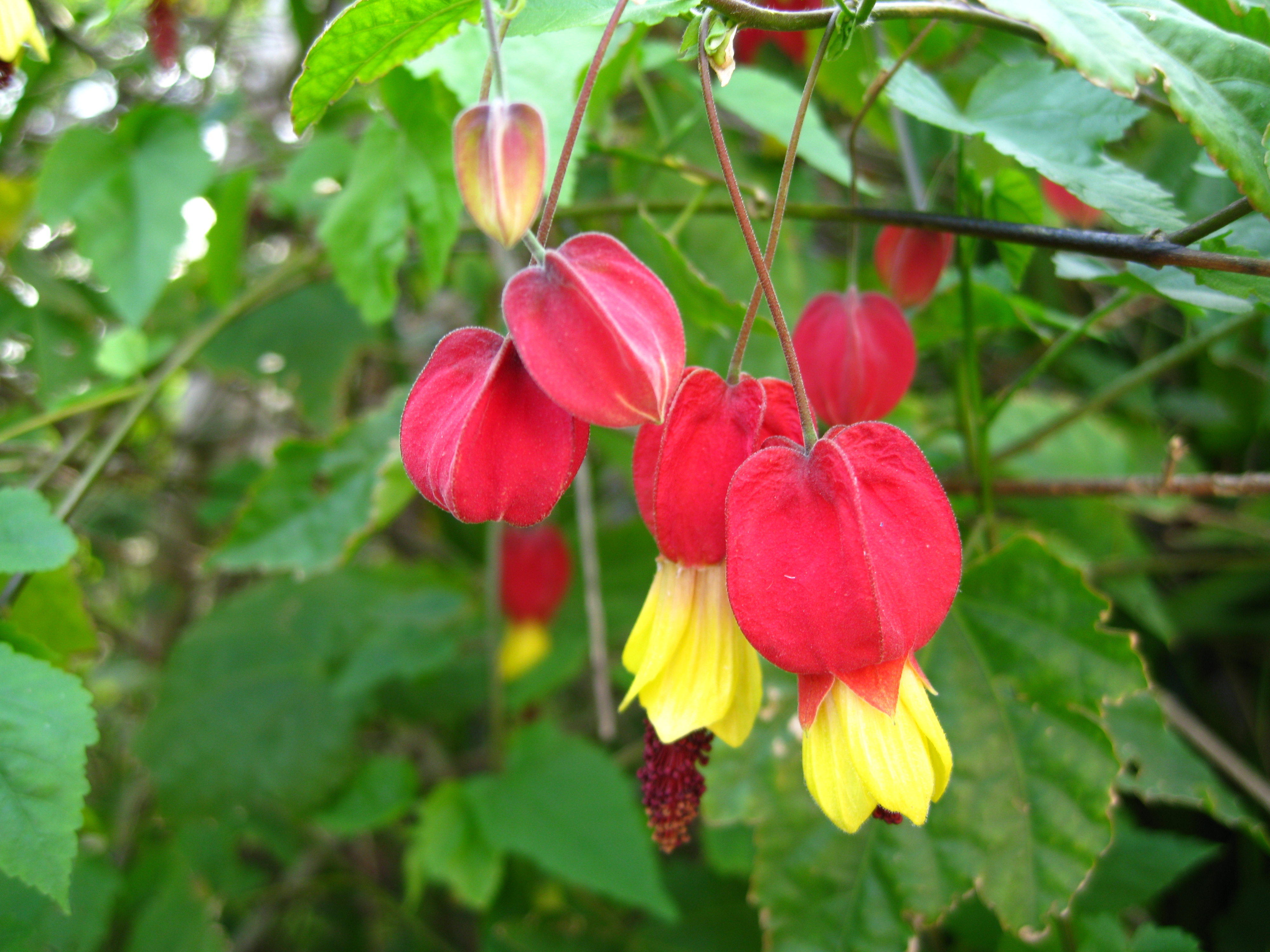 Abutilon megapotamicum ウキツリボク (チロリアンランプ)